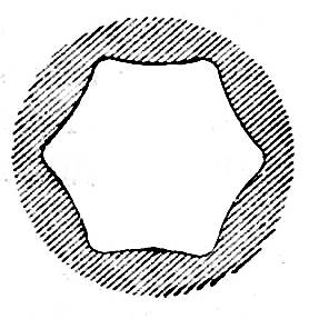 Это изображение было использовано для иллюстрирования статьи «Канал огнестрельного оружия» опубликованной в двенадцатом томе «Военной энциклопедии», который был издан книгоиздательским товариществом И. Д. Сытина в 1913 году в столице Российской империи городе Санкт-Петербурге. Британский инженер-механик Джозеф Витворт (иначе Витуорт, Уитворт) предложил для ружей и для артиллерийских орудий делать канал огнестрельного оружия в виде призмы шестигранного сечения (см. рисунок), тоже скрученной около оси по винтовой линии; такой же вид имела и средняя часть продолговатого снаряда. При такой форме и точности отделки снаряд прилегал большей частью своей поверхности и мог получать большое число оборотов даже при небольшом заряде, так как скручиванию ствола можно было придать большую крутизну без опасения срыва ведущих частей снаряда.